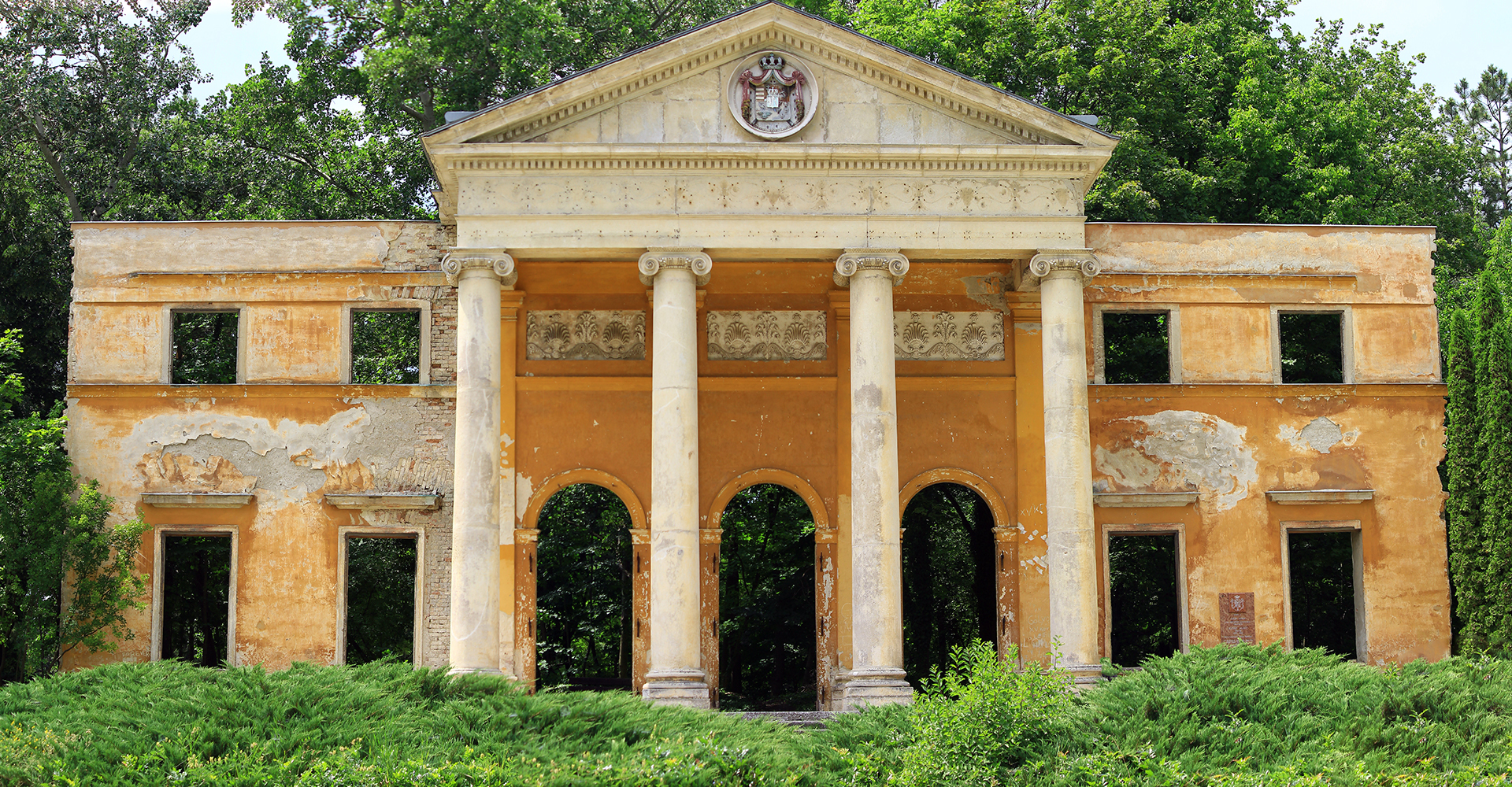 Habsburg-kastély megmaradt középrésze This is a photo of a monument in Hungary. Identifier: 14952